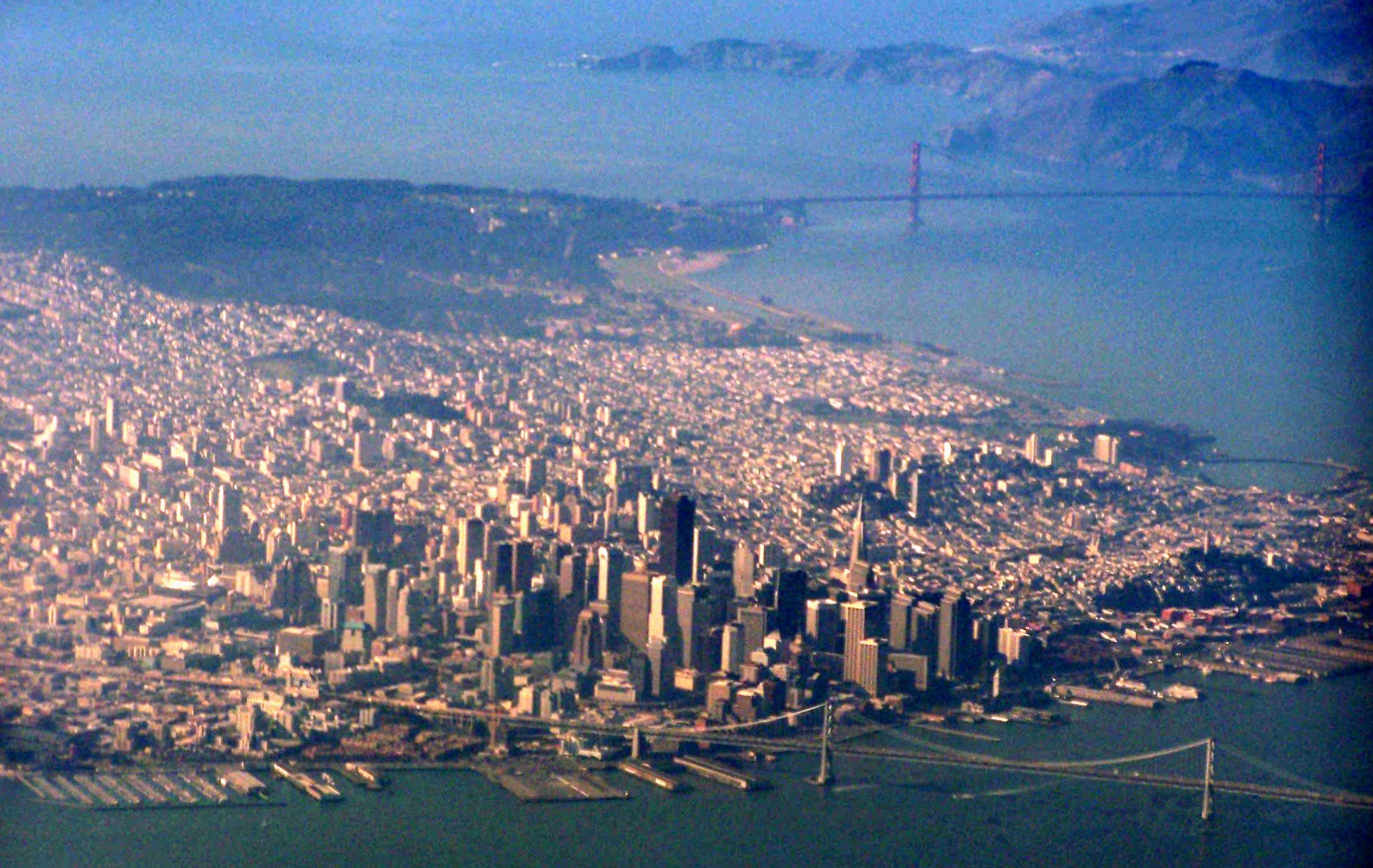 Luchfoto van CA San Francisco down-town - Golden Gate.